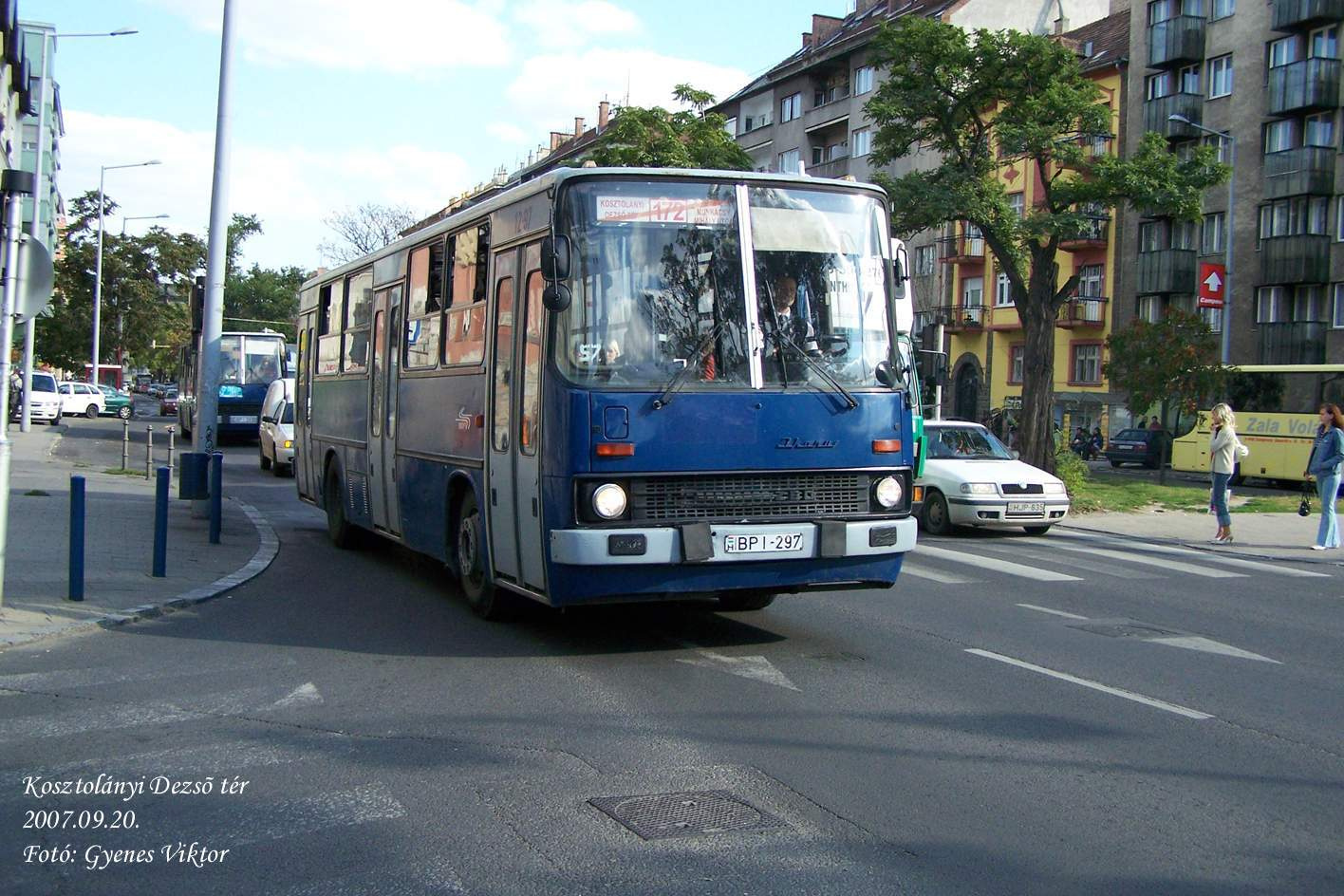 Gyors 172-es jelzésű Ikarus 260-as busz a Kosztolányi Dezső téren